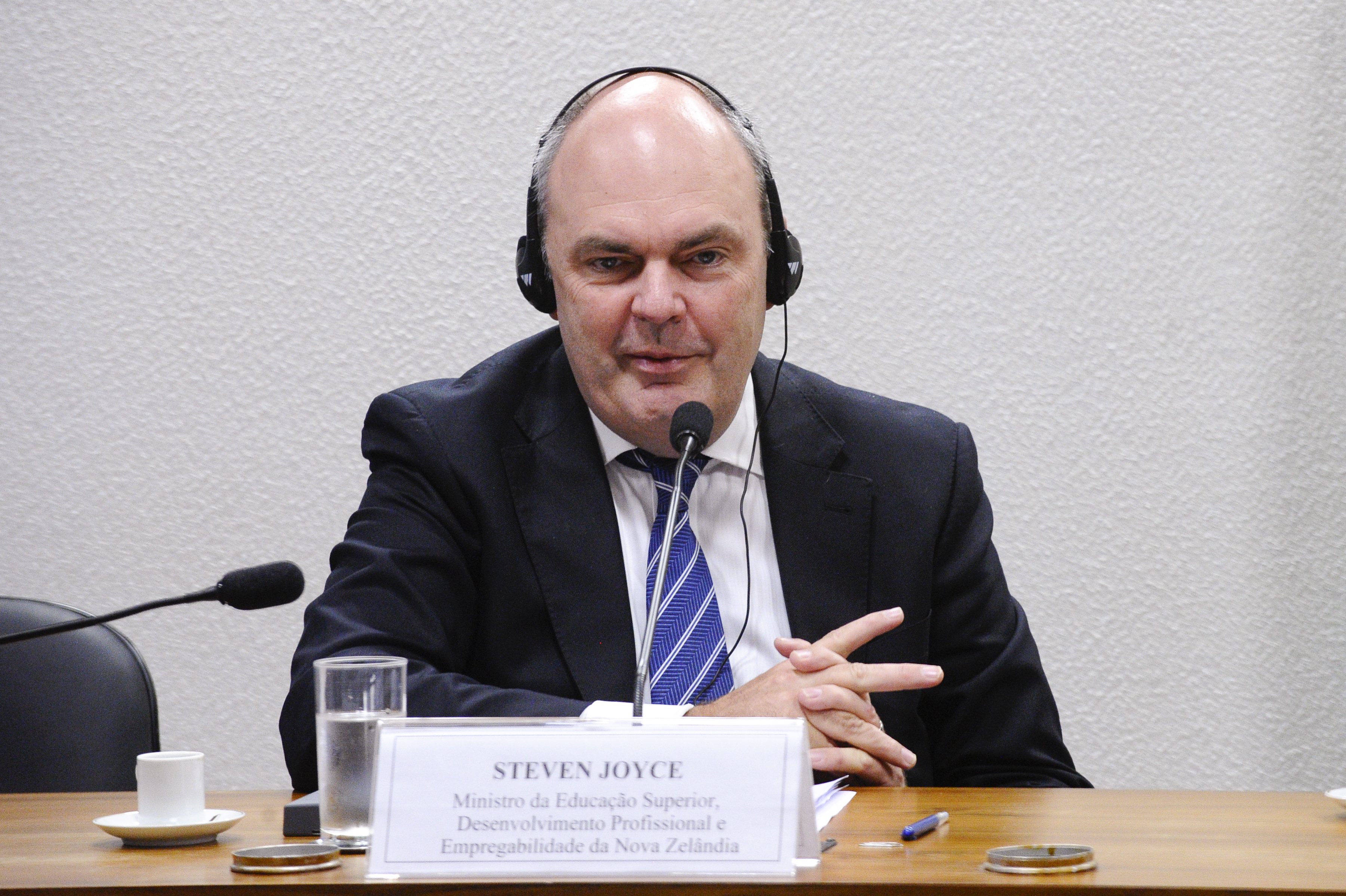 Sala de comissões do Senado Federal durante audiência pública da Comissão de Educação, Cultura e Esporte (CE). Palestra com o ministro da Educação Superior, Desenvolvimento Profissional e Empregabilidade da Nova Zelândia, Steven Joyce (foto). Foto: Edilson Rodrigues/Agência Senado